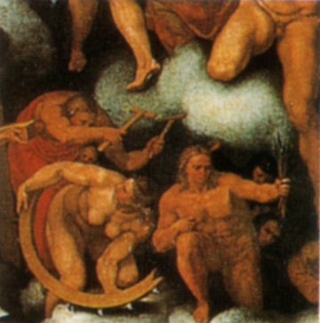 Marcello venusti, santi biagio e caterina prima della censura, 1549